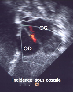 Flux au travers d'un FOP (doppler couleur)